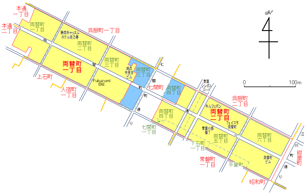 赤線内の黄色の面・・・現在の両替町の町域 赤字・・・両替町周辺の現在の町名 黄線・・・現在の町界 青線・・・公道 黒字・・・町内の主要施設名 緑色の一点鎖線・・・旧町界 一点鎖線内の水色の面・・・旧両替町で現在は七間町となっている区域 緑字・・・旧町名 旧町名、町界は1932年発行「静岡市全図」を、現在の町界はウェブ地図サイト等を基に本人が作成。